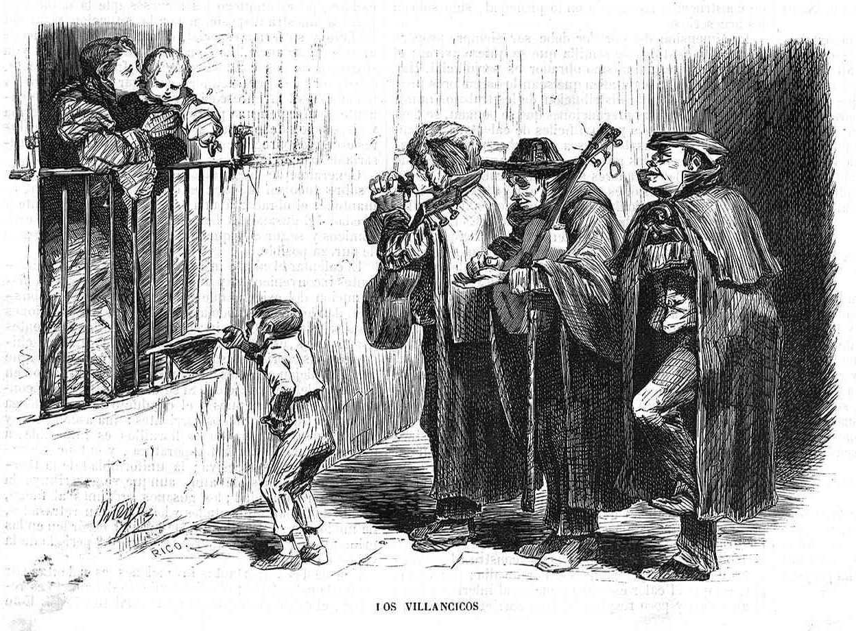 Los villancicos, en la revista española El Museo Universal.